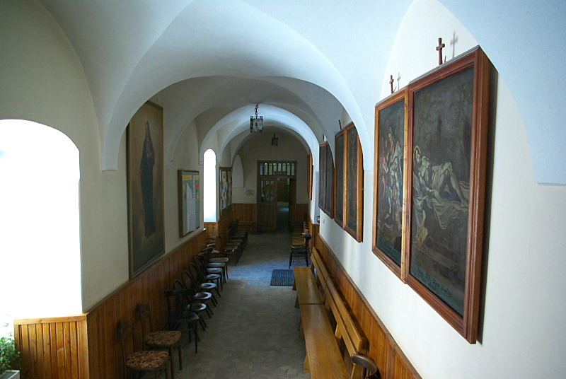 Korytarz w klasztorze Franciszkanów w Sanoku